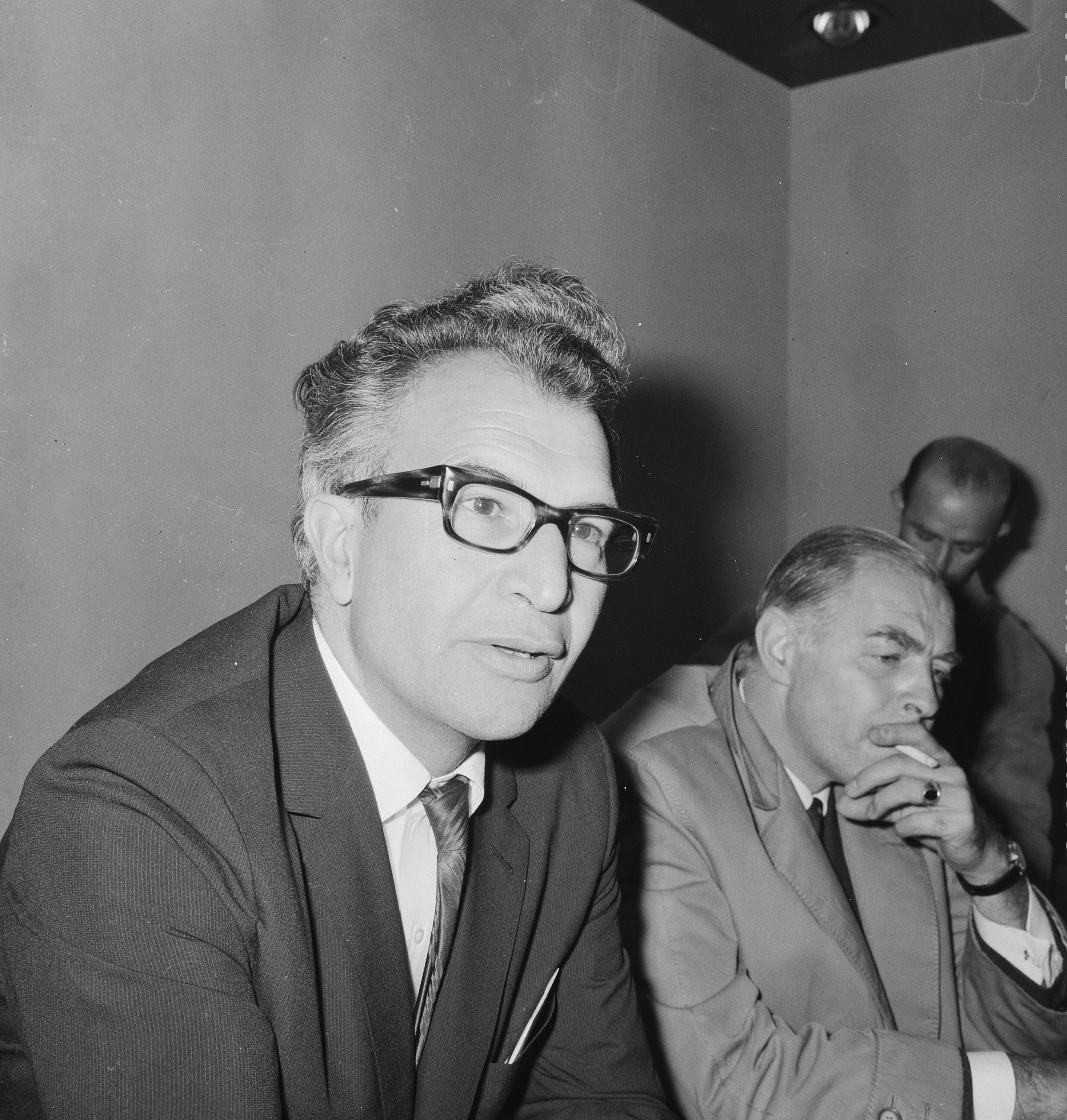 Collectie / Archief : Fotocollectie Anefo Reportage / Serie : [ onbekend ] Beschrijving : Aankomst Dave Brubeck met echtgenote en zoontje op Schiphol, Dave Brubeck (kop) Datum : 9 oktober 1964 Locatie : Noord-Holland, Schiphol Trefwoorden : ECHTGENOTES, aankomsten Persoonsnaam : Dave Brubeck Fotograaf : Nijs, Jac. de / Anefo Auteursrechthebbende : Nationaal Archief Materiaalsoort : Negatief (zwart/wit) Nummer archiefinventaris : bekijk toegang 2.24.01.03 Bestanddeelnummer : 916-9888